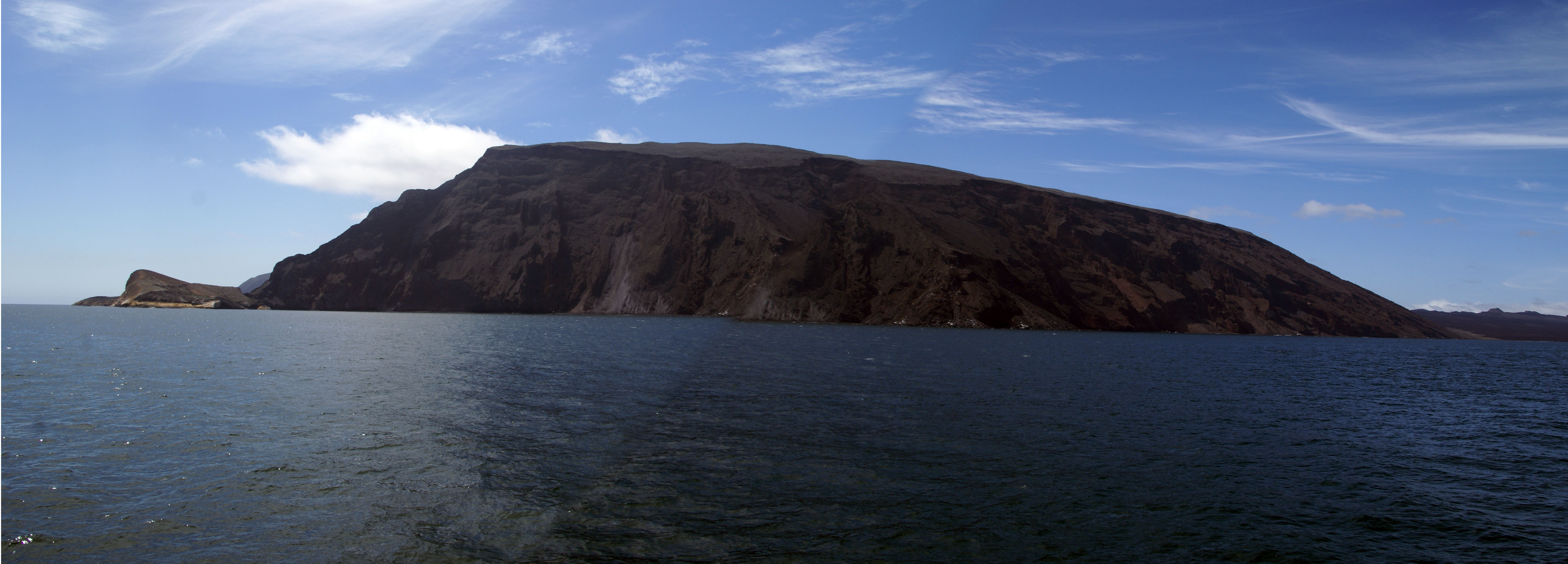 Fernandina island Galapagos